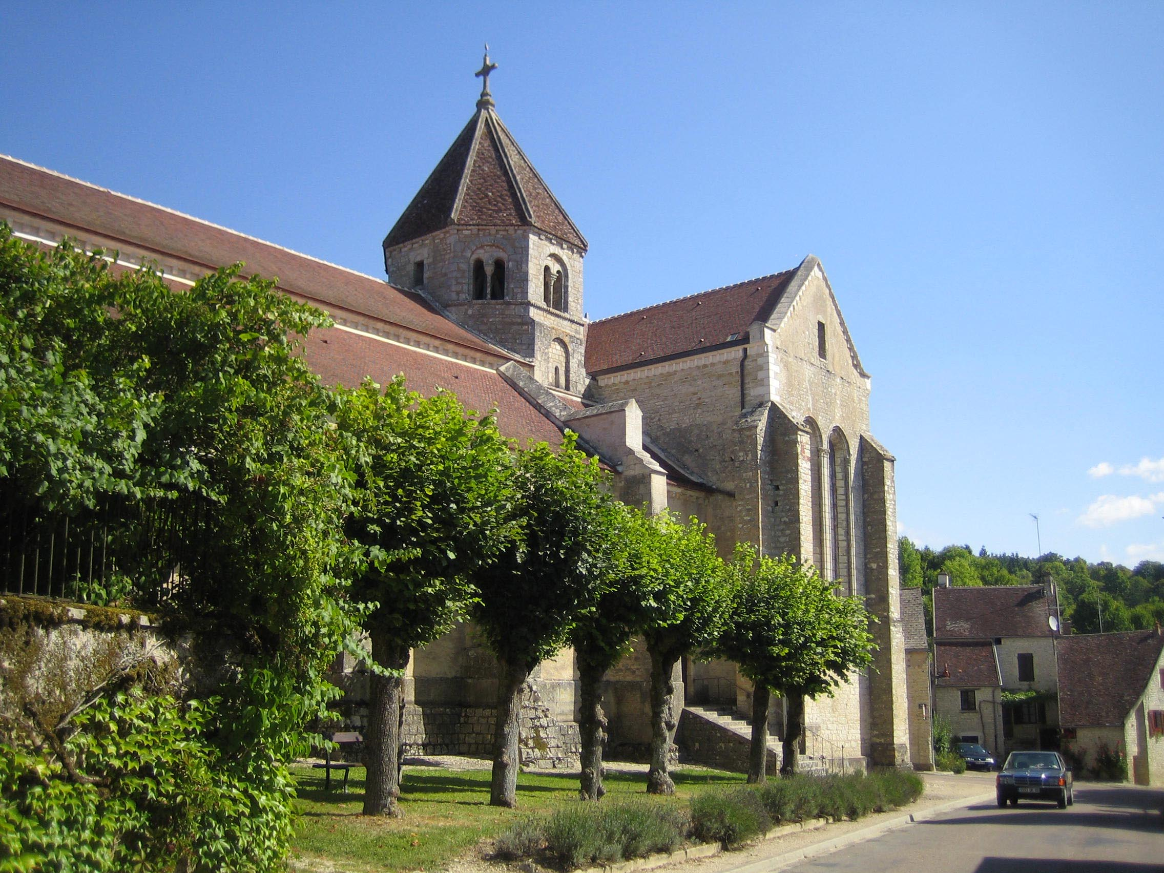 Sacy (Yonne, Bourgogne, France-. L'église.